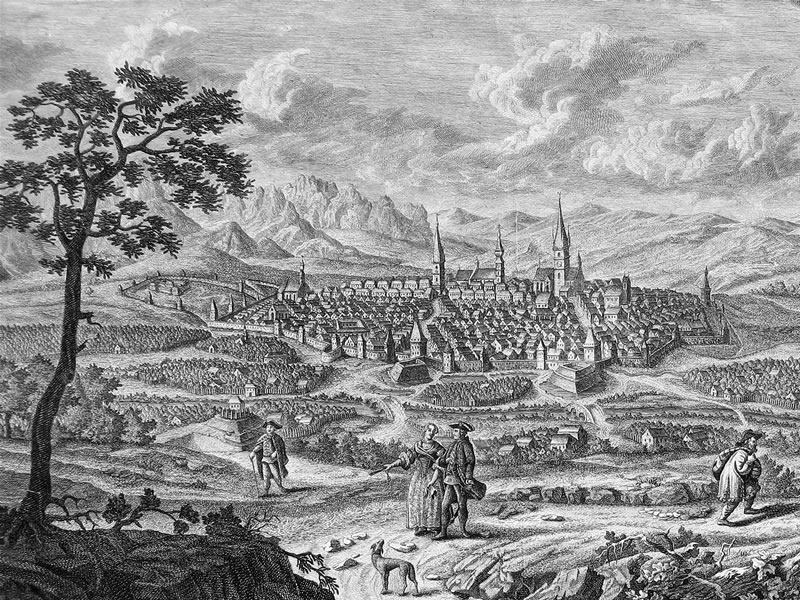 Sibiu - vedere de pe Deaulul Gușteriței